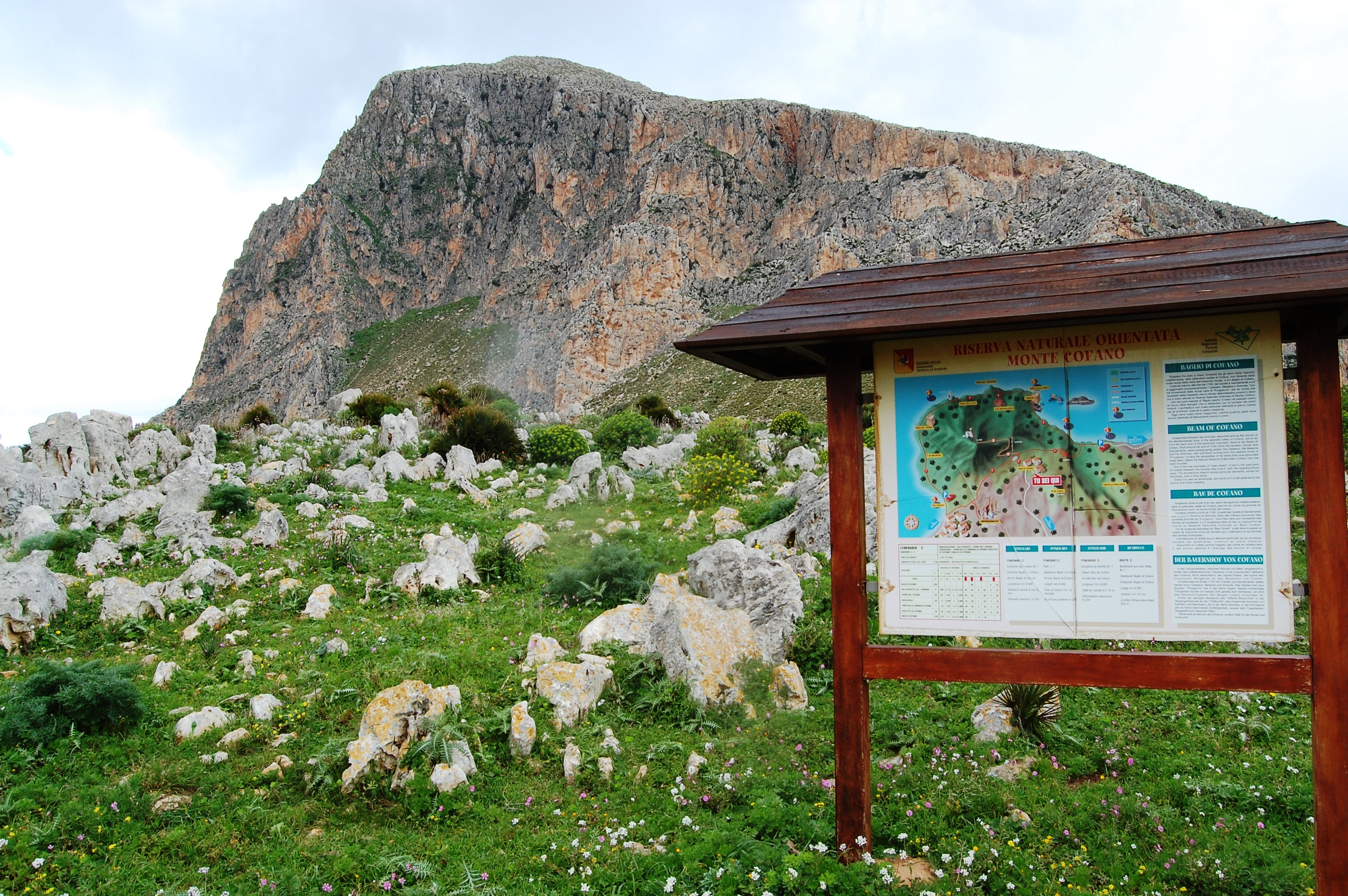 Riserva naturale Monte Cofano, Sicily